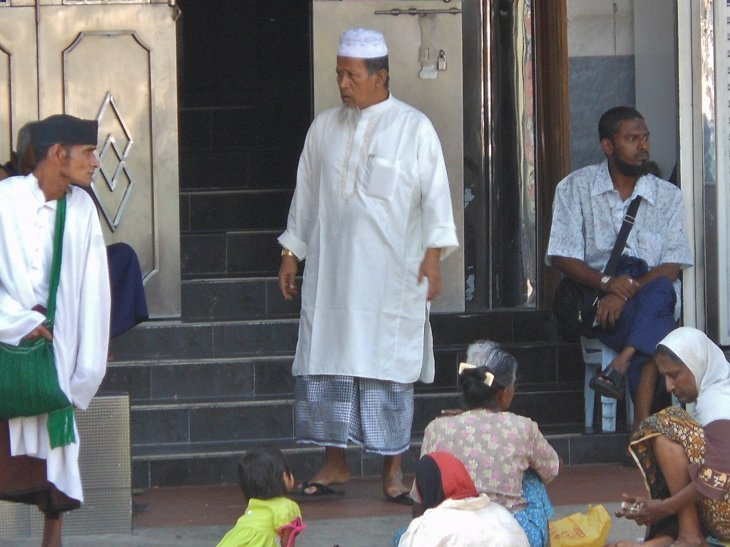 Outside the Mosque